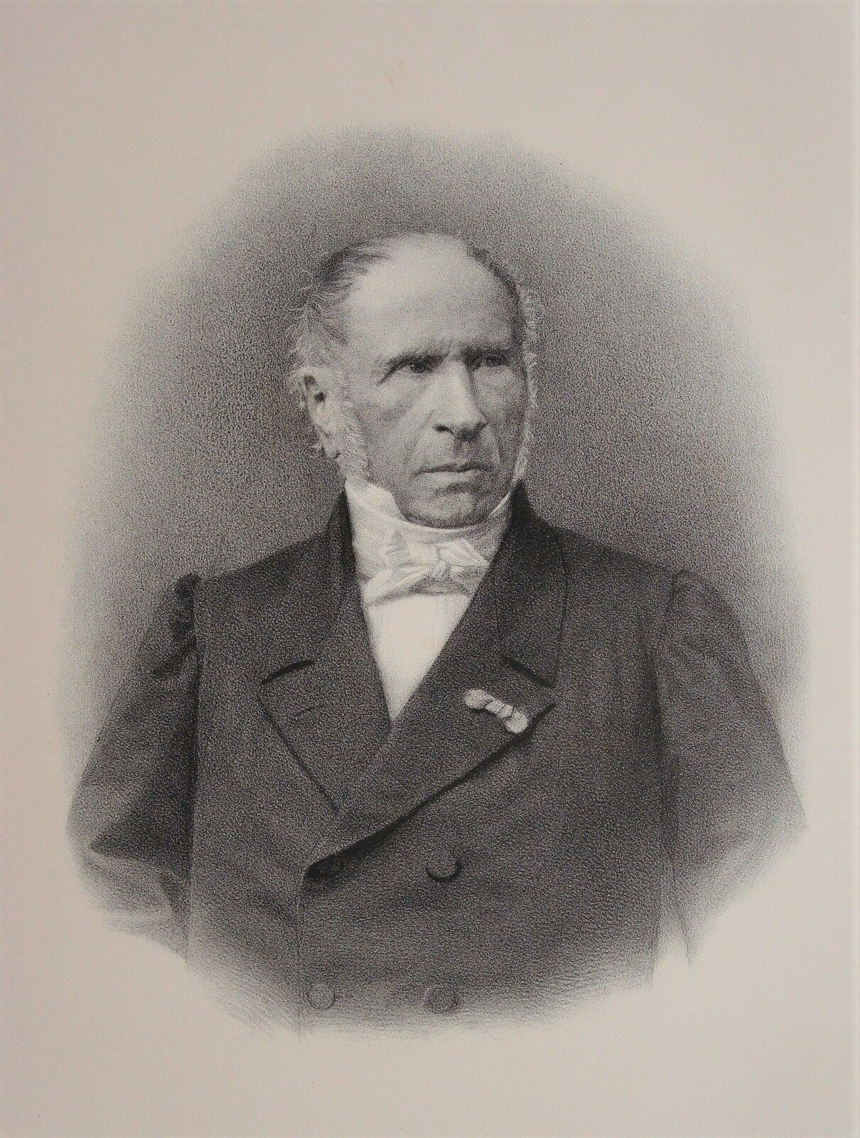 André Dupin